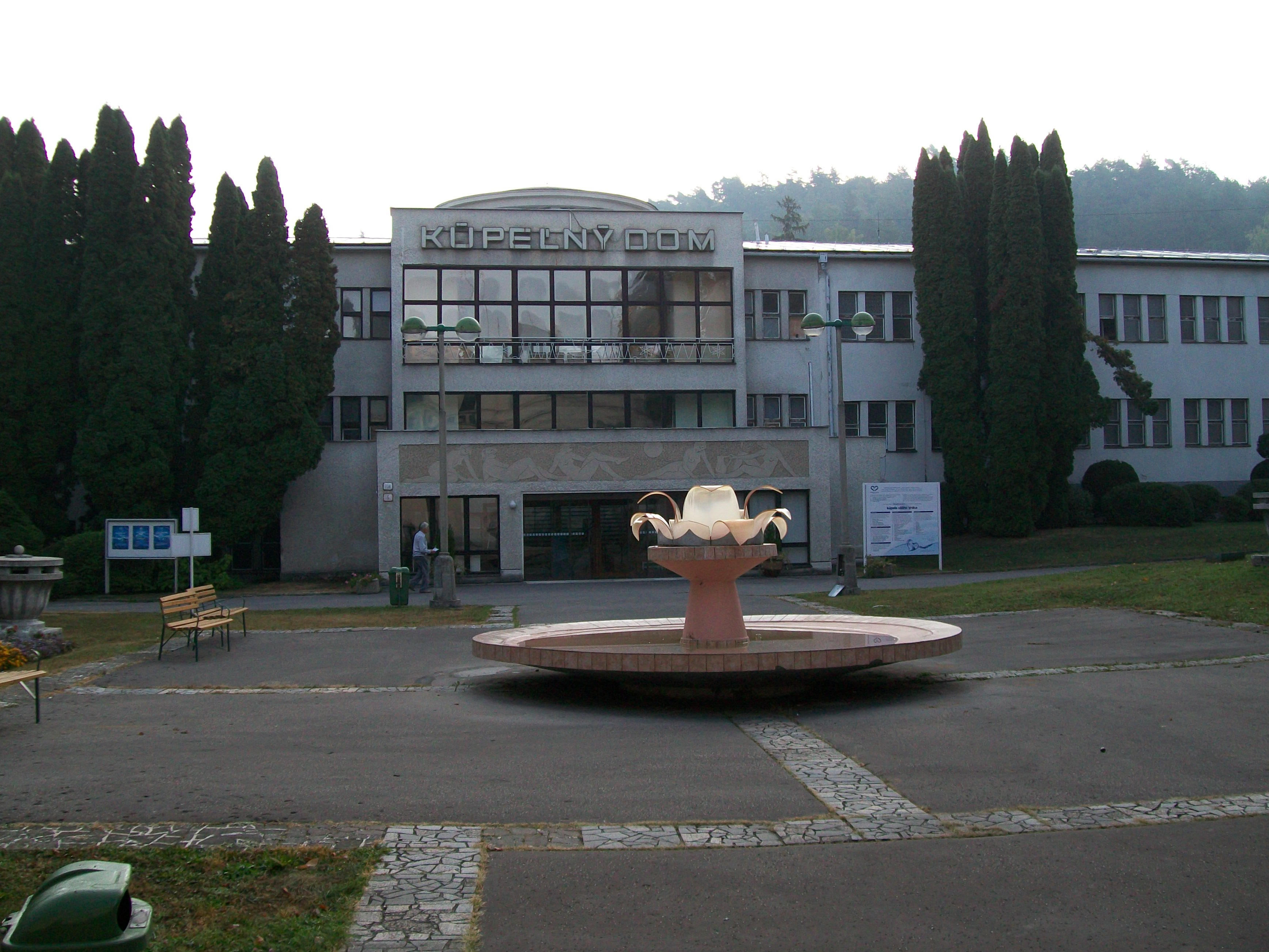 Kúpeľný dom